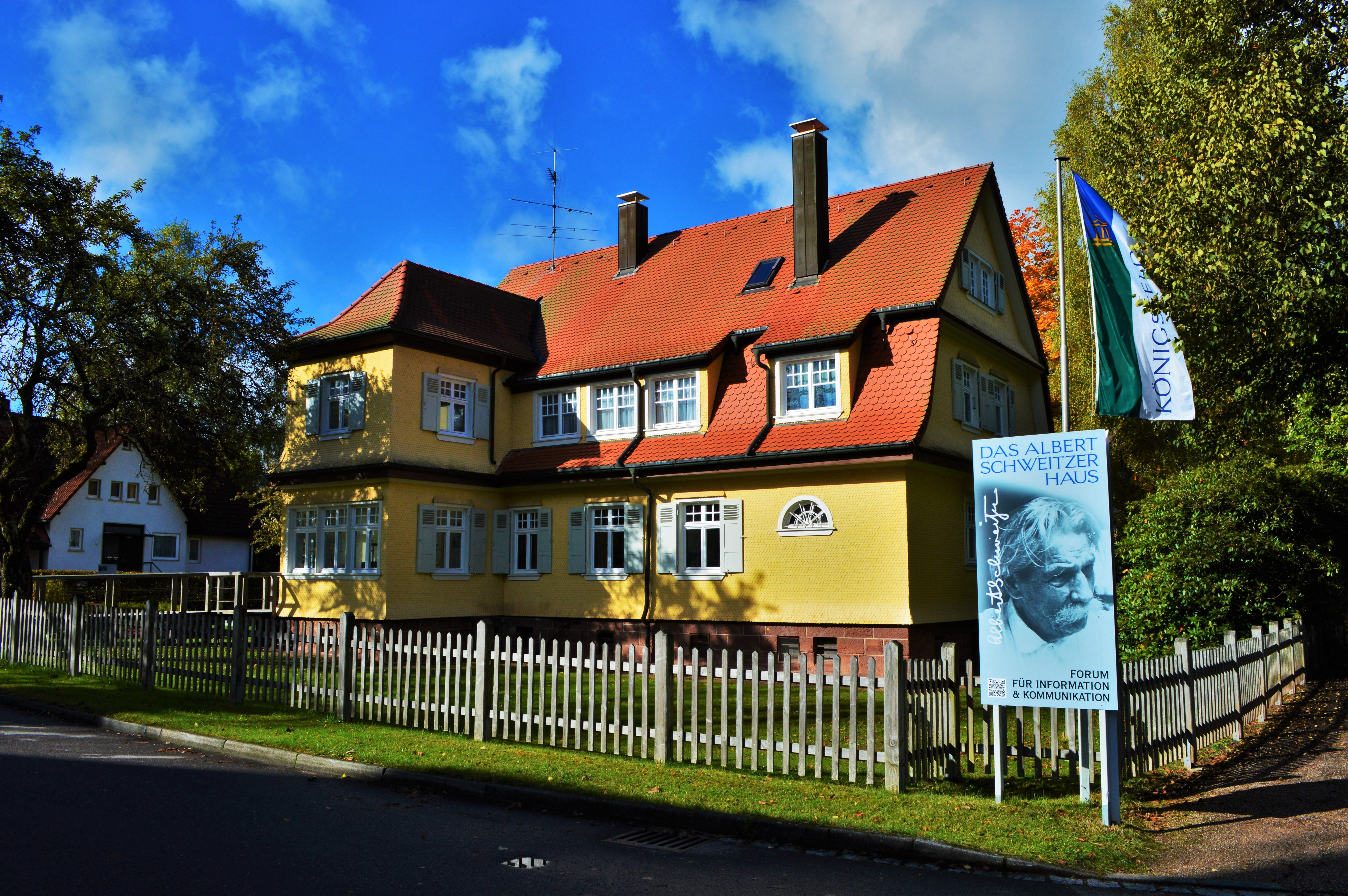 Königsfeld im Schwarzwald - Albert-Schweizer-Haus